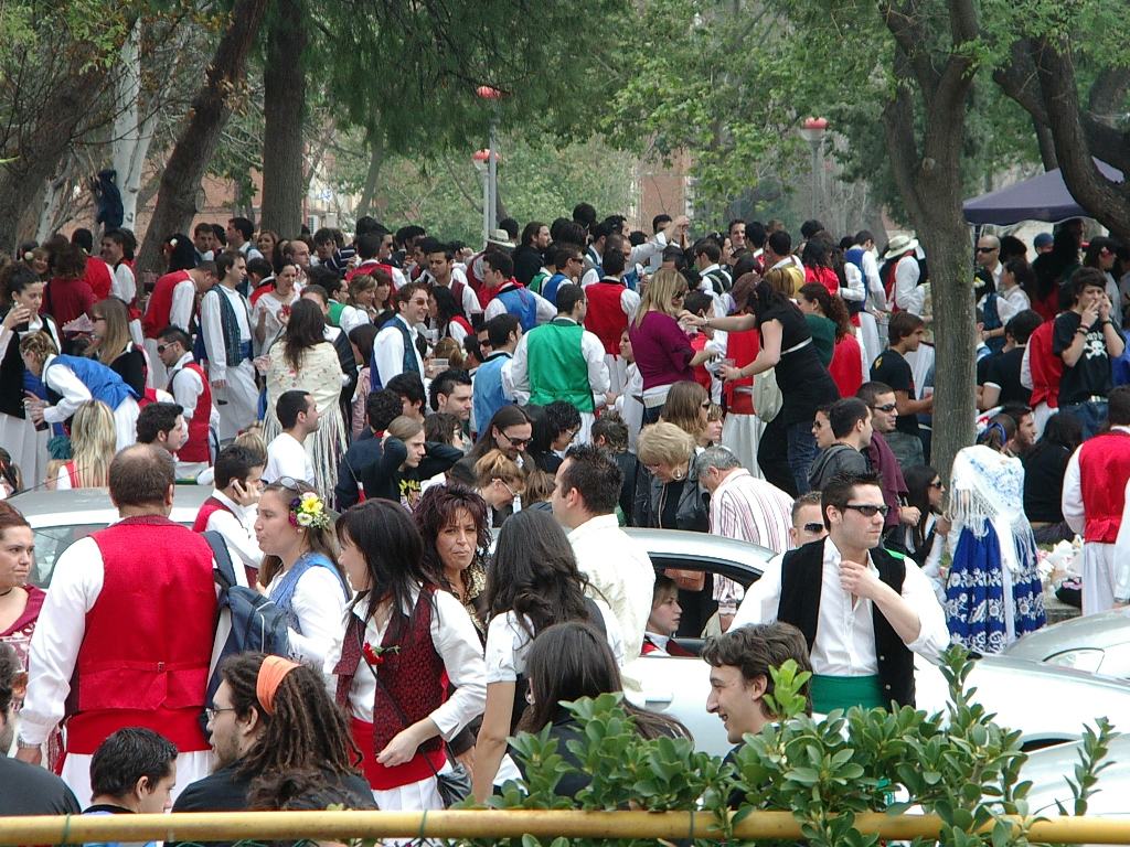 Día del Bando de la Huerta en Murcia, España